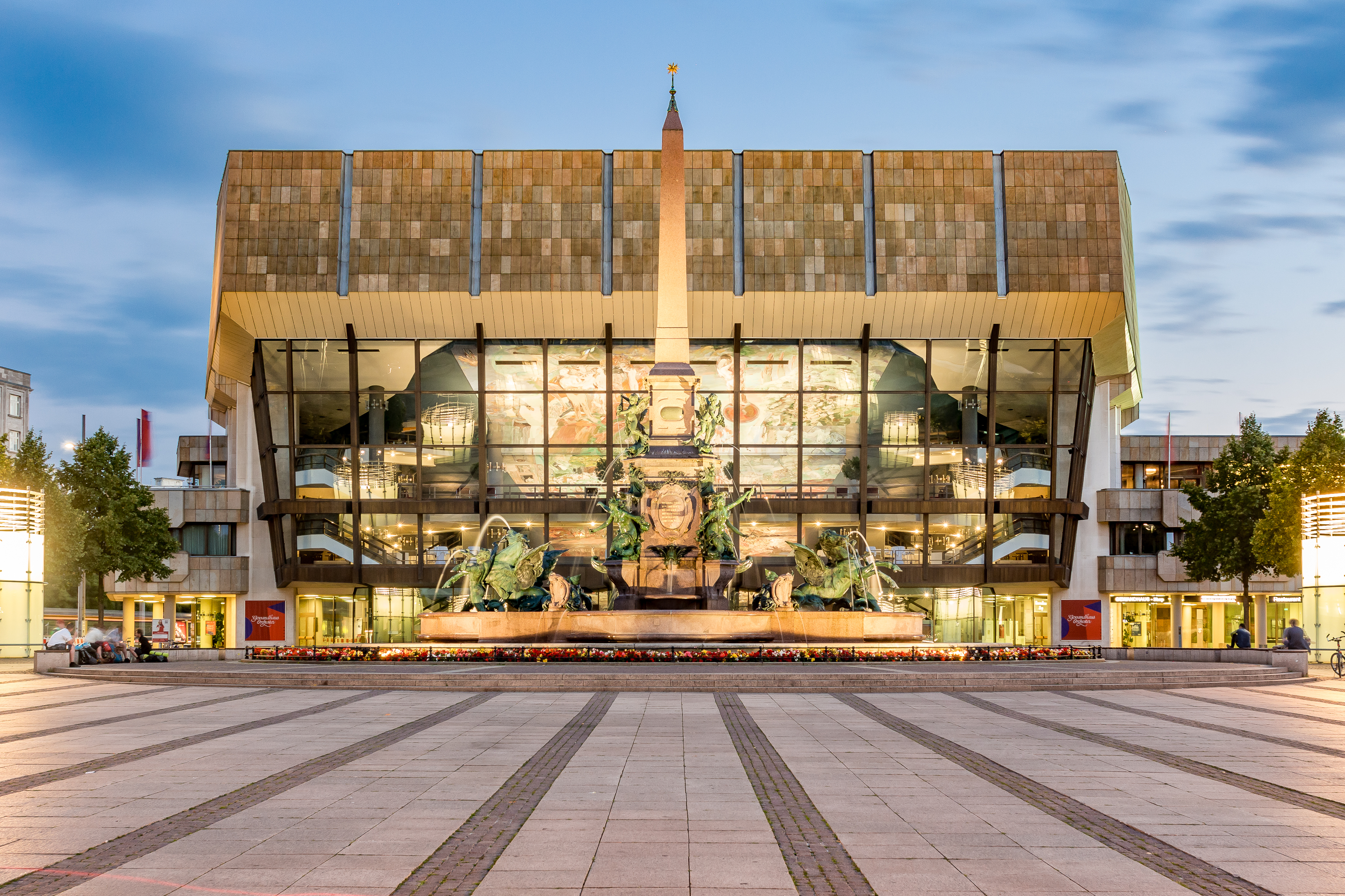 Das Gewandhaus am Augustusplatz in der Innenstadt von Leipzig bei Nacht, im Vordergrund der Mendebrunnen.